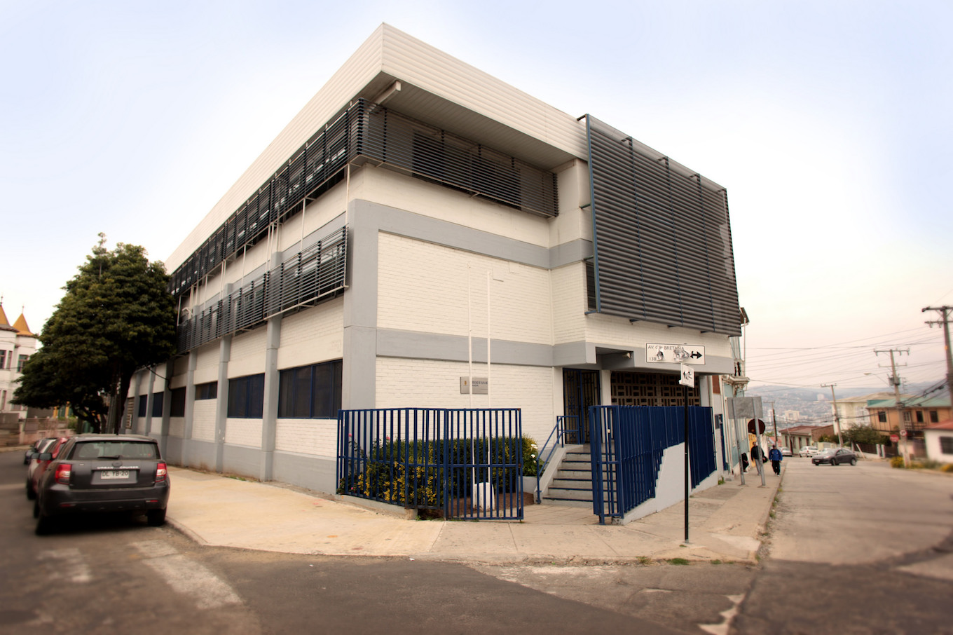 Gran Bretaña UPLA